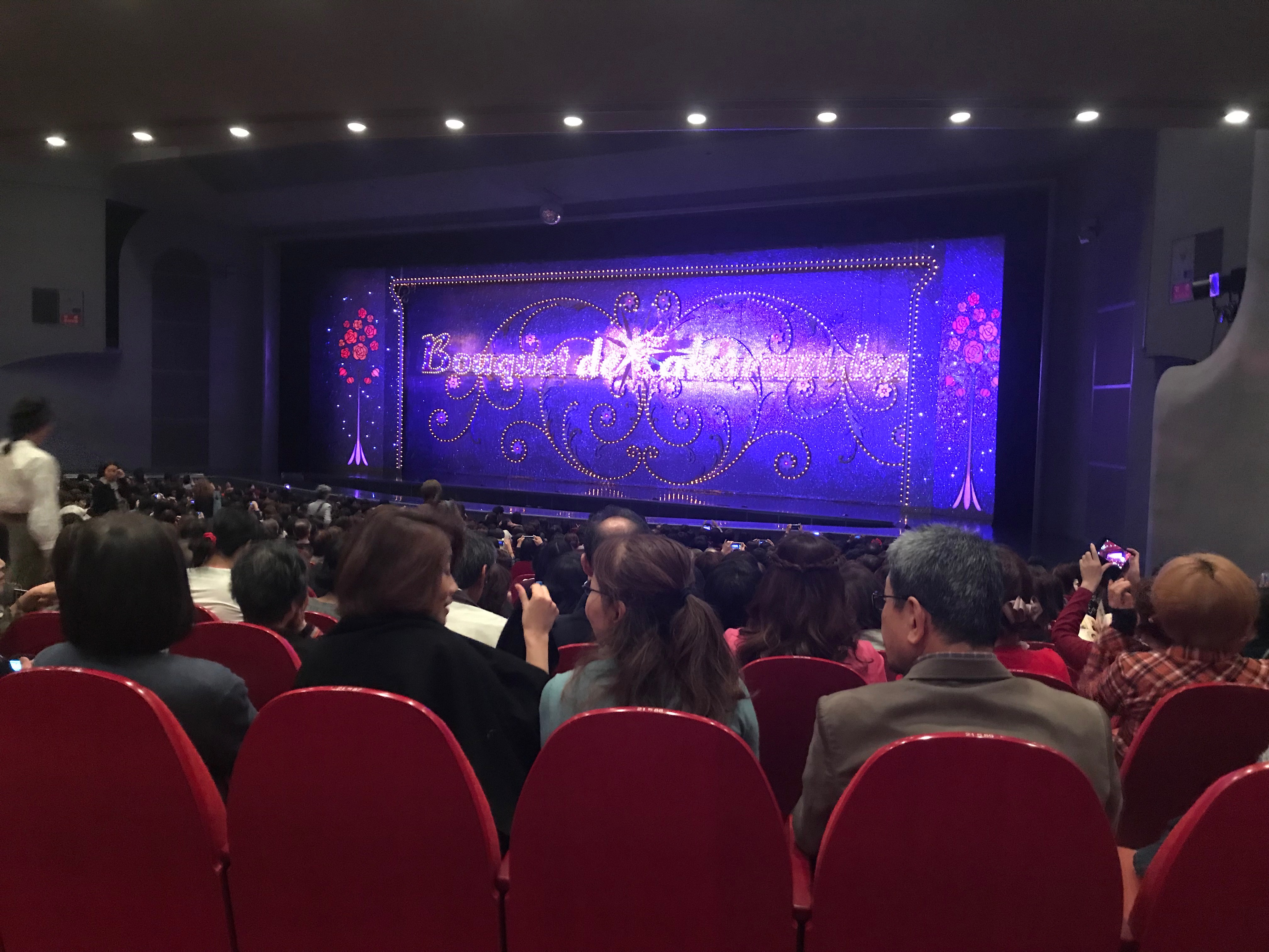 Takarazuka Grand Theater